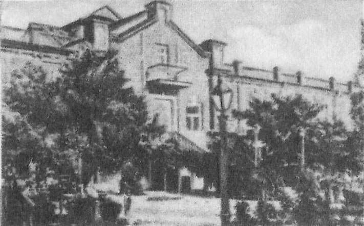 Гостиница "Мойнаки". Конец XIX в.